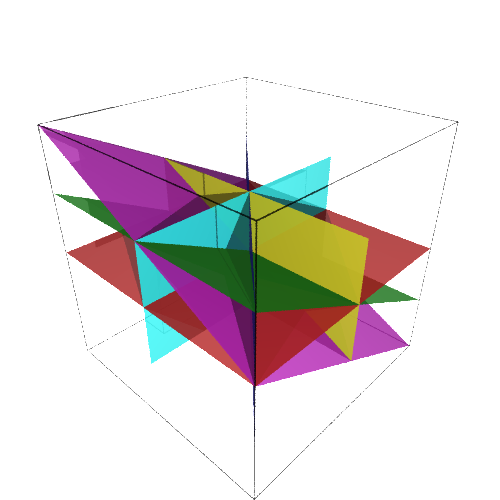 un arrangement d'hyperplans (image faite avec sage version 6.5.beta4)